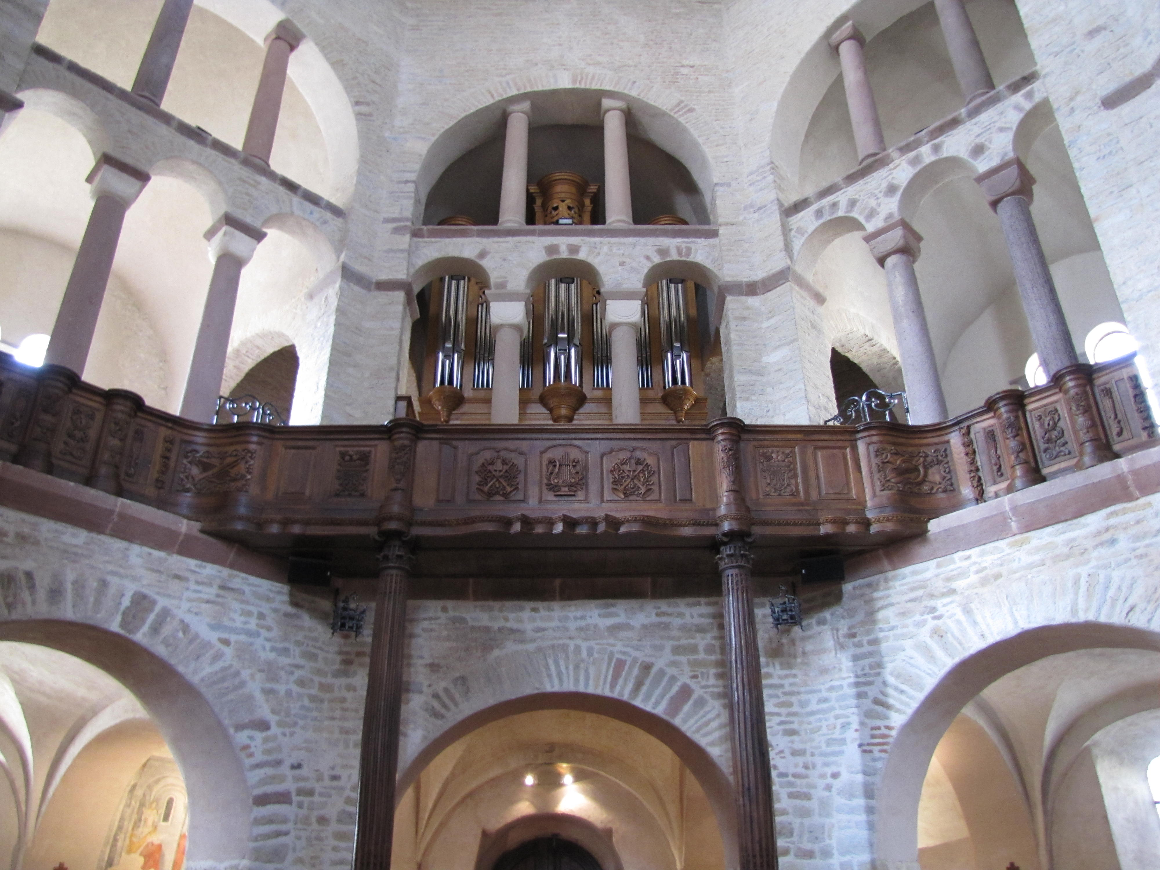 Alsace, Haut-Rhin, Ottmarsheim, Église abbatiale d'Ottmarsheim (PA00085580, IA00096033).Reconstruction à l'identique, après incendie, de l'orgue Joseph Waltrin & Jean-Georges Rohrer (1726), par Richard Dott (2000): This object is classé Monument Historique in the base Palissy, database of the French furniture patrimony of the French ministry of culture, under the references PM68000920 and IM68004325. This object is classé Monument Historique in the base Palissy, database of the French furniture patrimony of the French ministry of culture, under the references buffet PM68000284 buffet and instrument PM68000625 instrument.